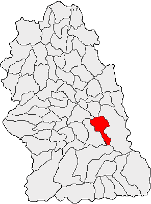 Categorie:Hărţi ale judeţului Hunedoara